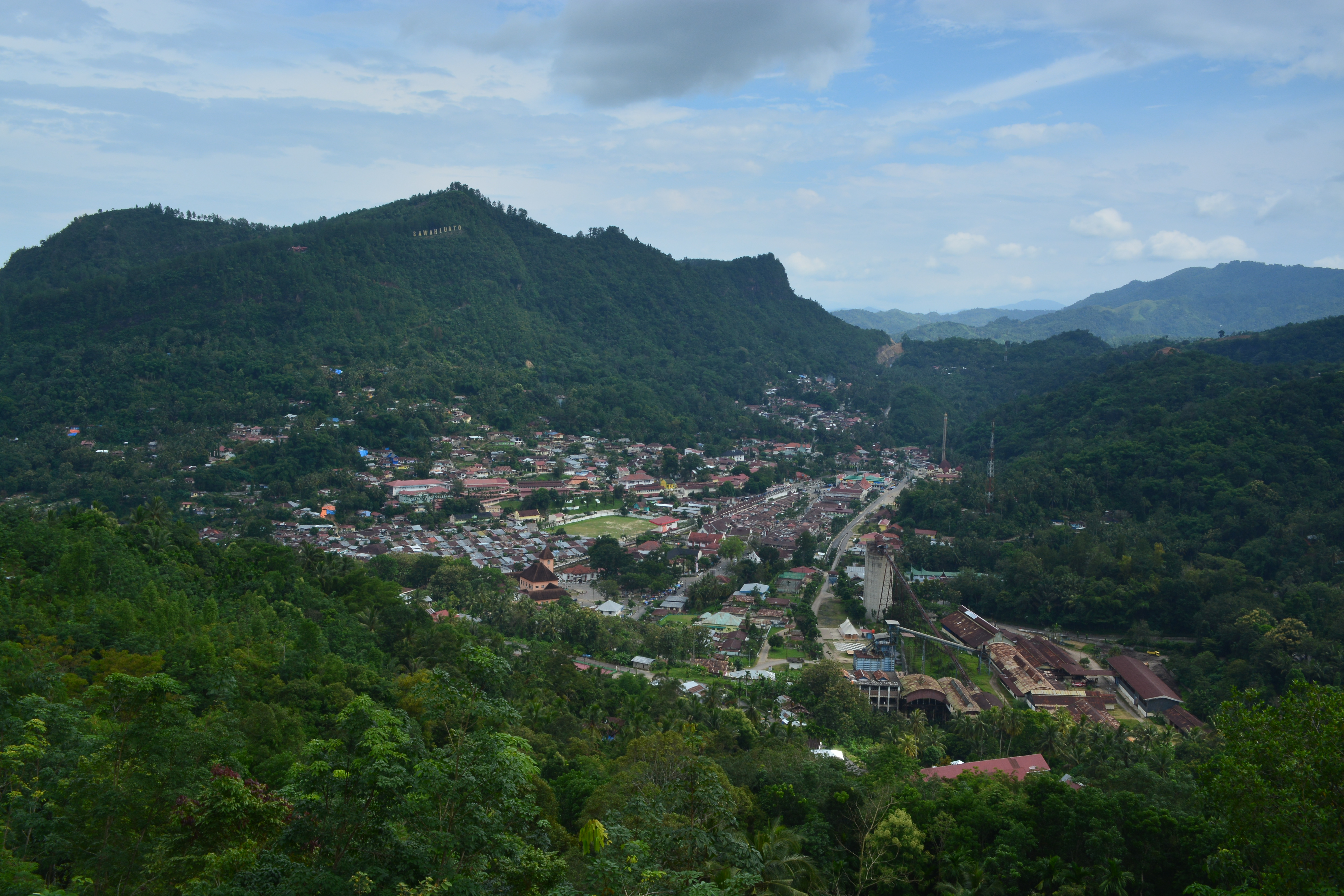 Panorama Sawahlunto